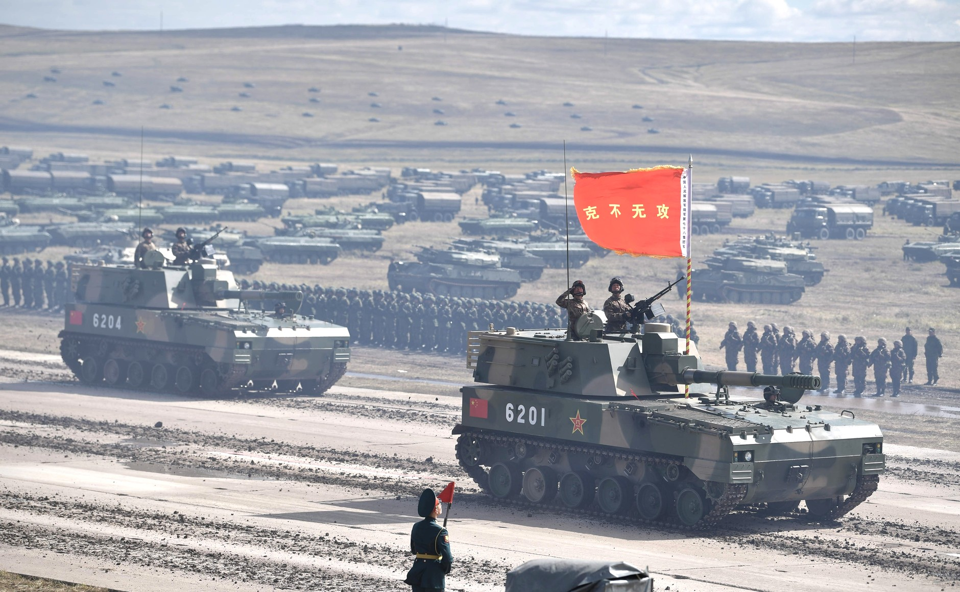 Основной этап манёвров «Восток-2018» на полигоне Цугол в Забайкальском крае.